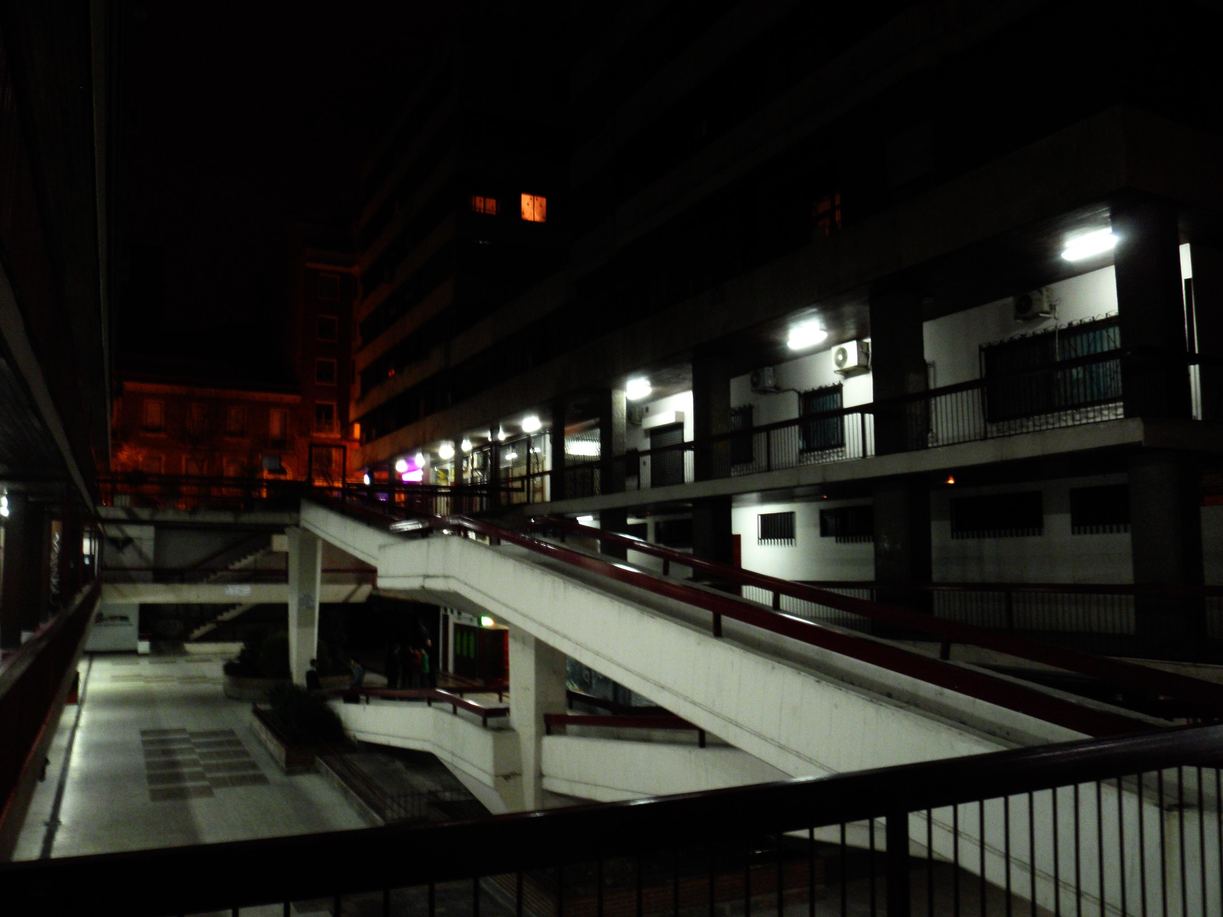 Bajos de Argüelles o de Aurrerá, Madrid.